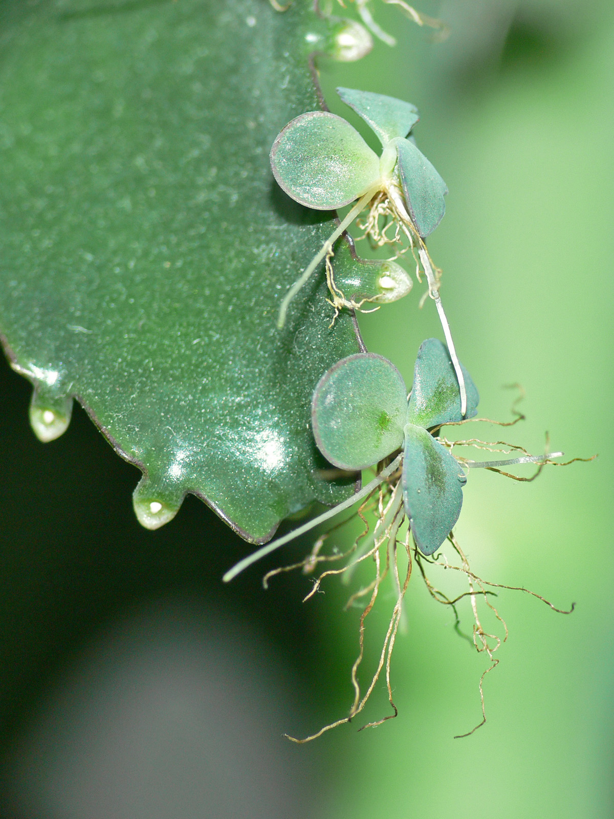 Kalanchoe pinnata - vegetative reproduction